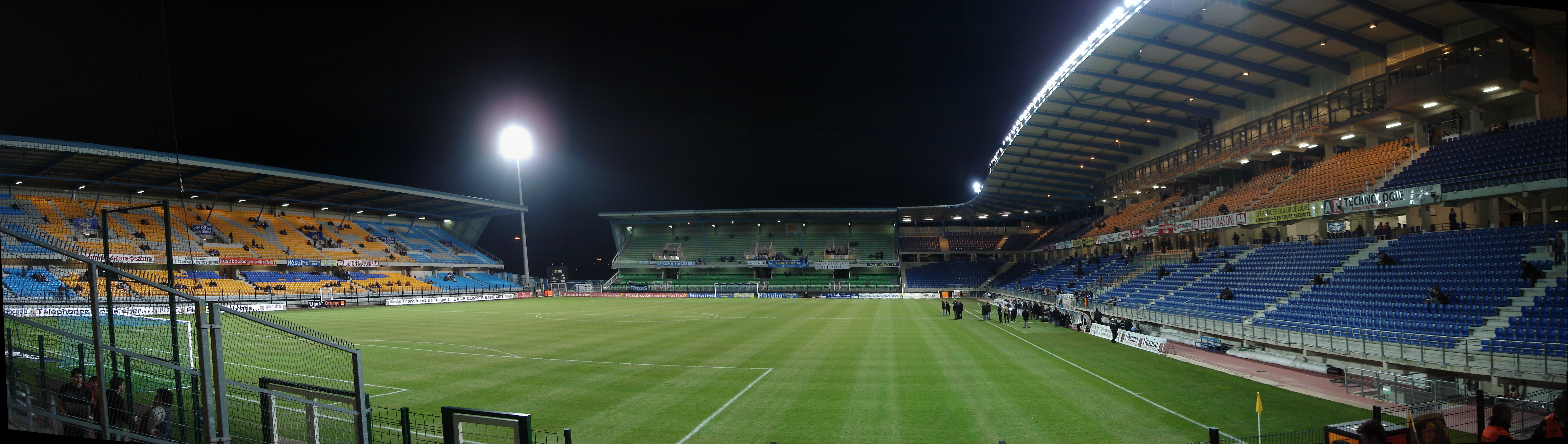 Panorama du stade de l'Aube (Troyes)